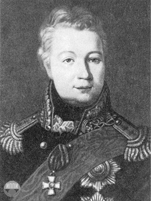 Pavel Vasiljevič Čičagov.